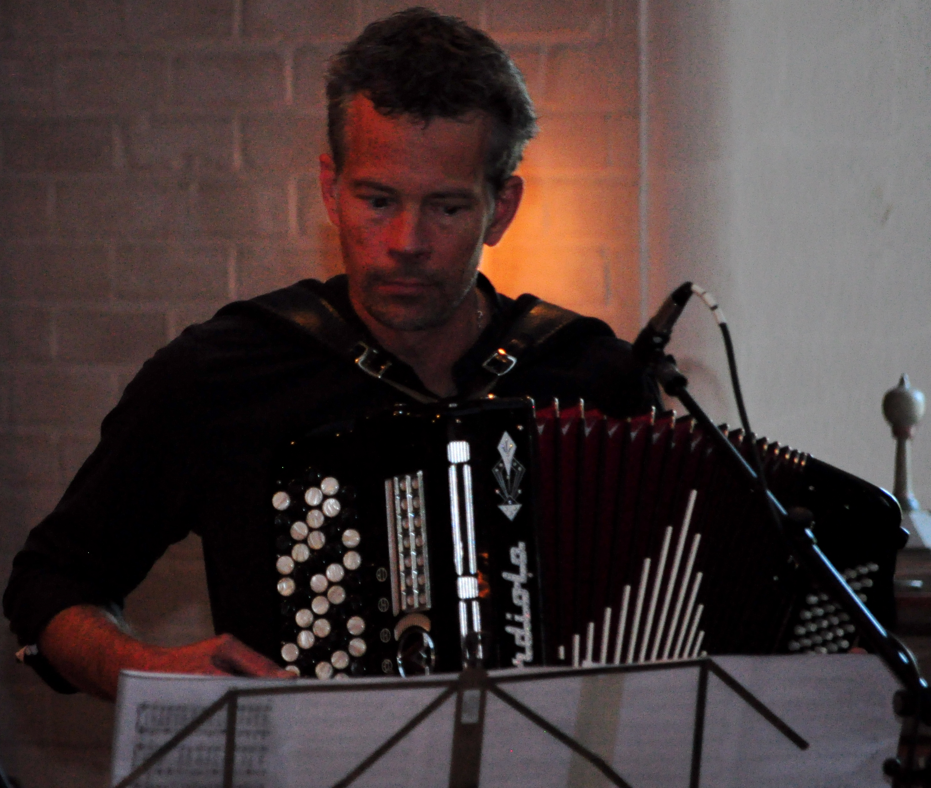 Erik Pekkari vid en konsert i Östra Eds kyrka.